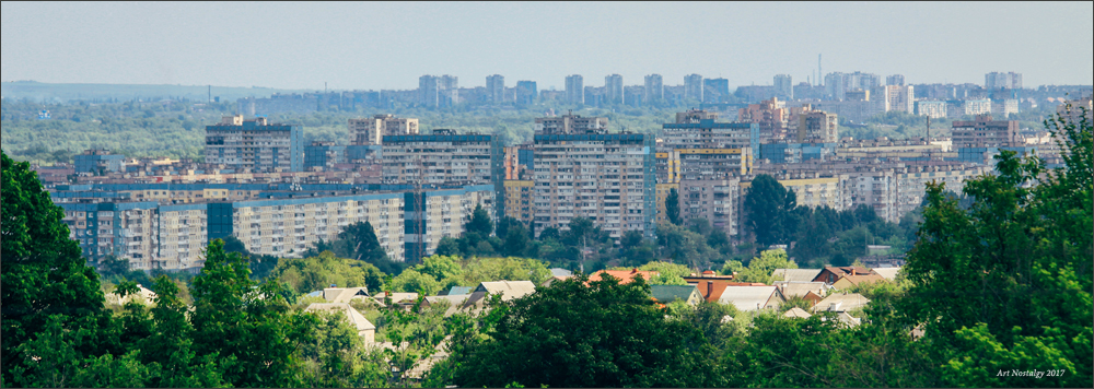 Вид з Діївки на багатоповерхову забудову Вітрила, Покровського й Червоного Каменя. На середньому плані, за річкою Дніпро, у Амур-Нижньодніпровському районі Дніпра, зліва - багатоповерхова забудова Ломівського, справа - селище Кам'янка. На задньому плані - багатоповерхівки на проспекті Миру у Лівобережному Індустріального району.